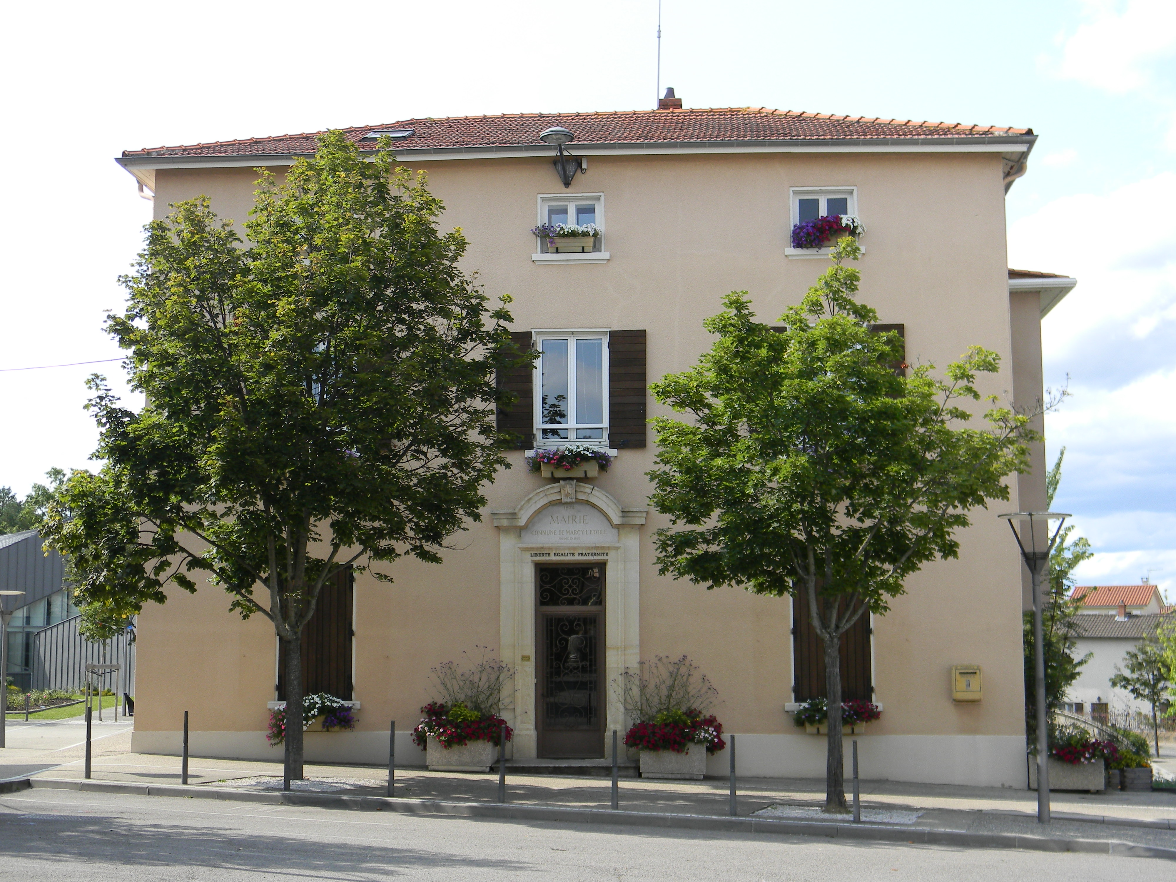 Mairie de Marcy-l'Étoile.